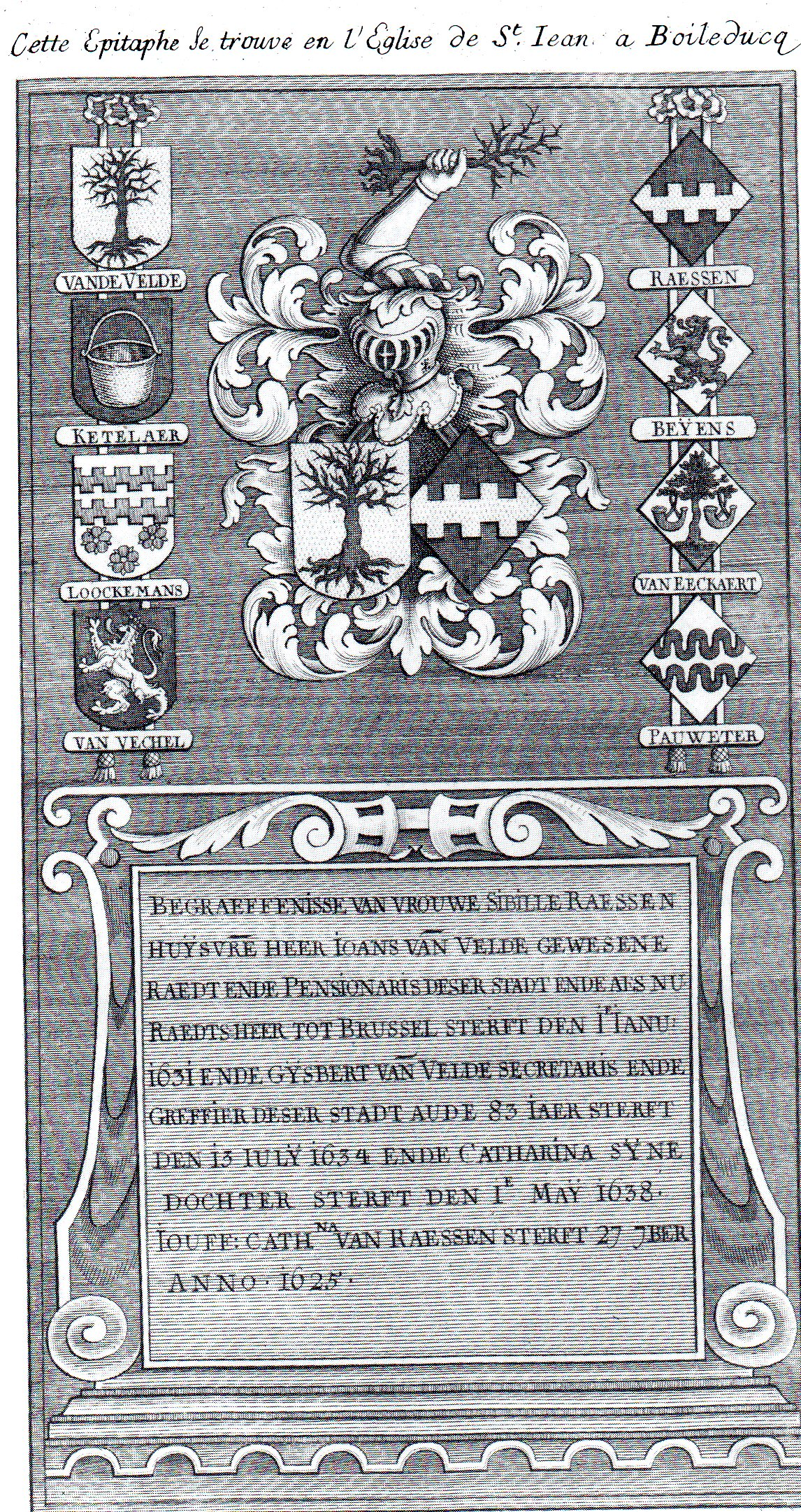 Pierre tombale de Sibylle Raessen, décédée en 1631, de Catharina Van Raessen 1625 etc... dans la cathédrale Saint-Jean à Bois-le-Duc. vec quartiers: Vande Velde, Ketelaer, Loockemans, Van Vechel, Raesse, Beÿens, Van Eeckaert, Pauweter.